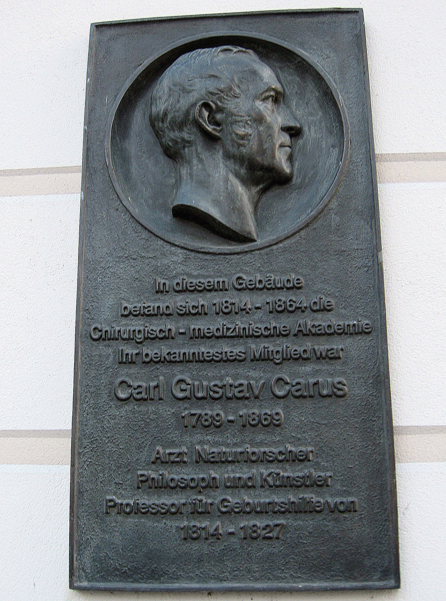 Gedenktafel für Carl Gustav Carus an der Frontseite des Kurländer Palais, rechts neben dem Eingang.